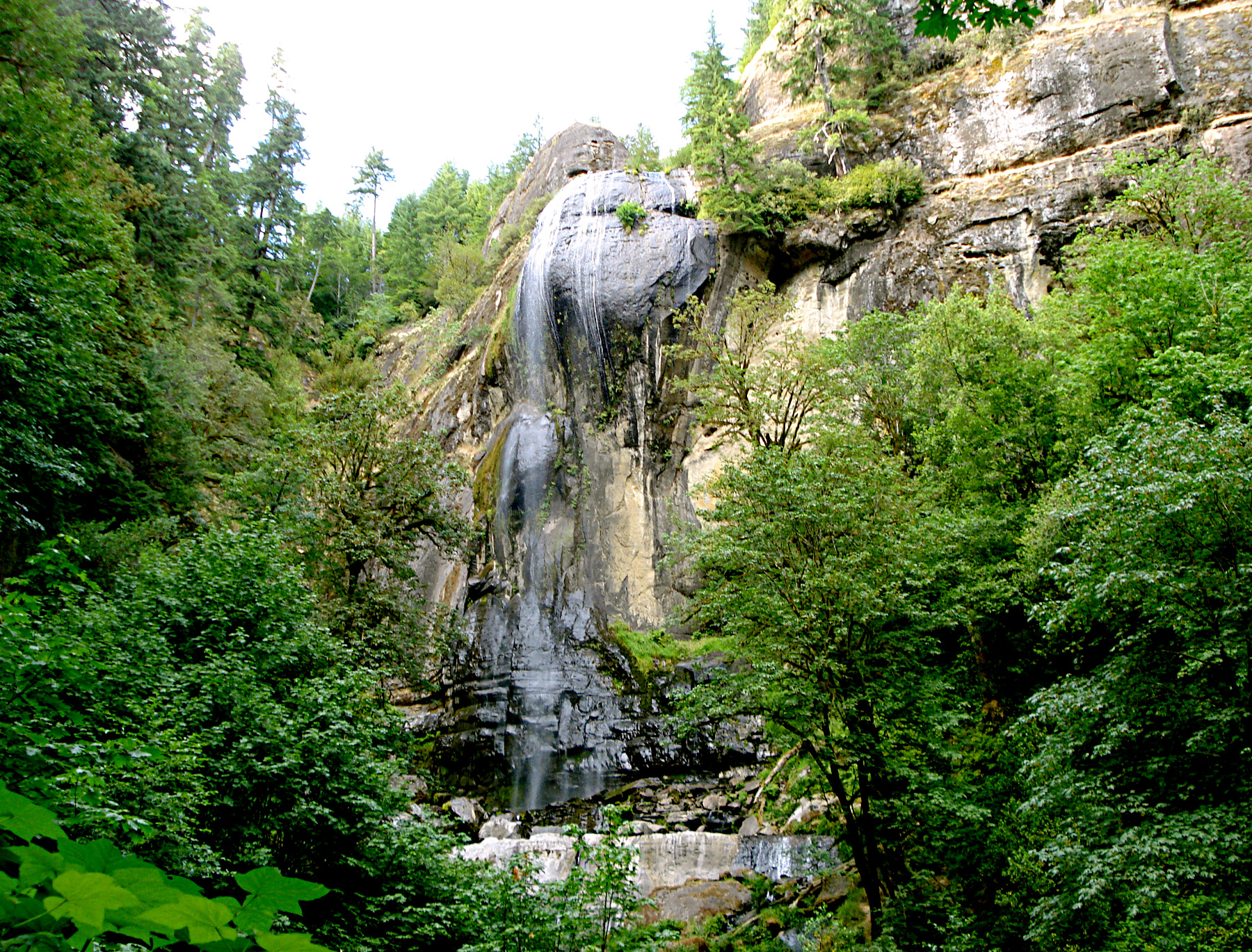 Golden and Silver Falls State Park.